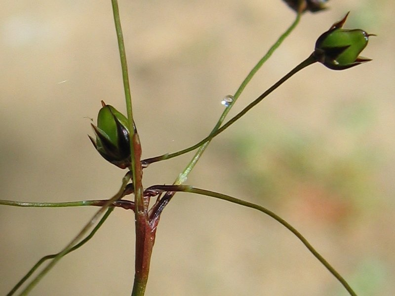 Haar-Hainsimse Luzula pilosa, Rügen